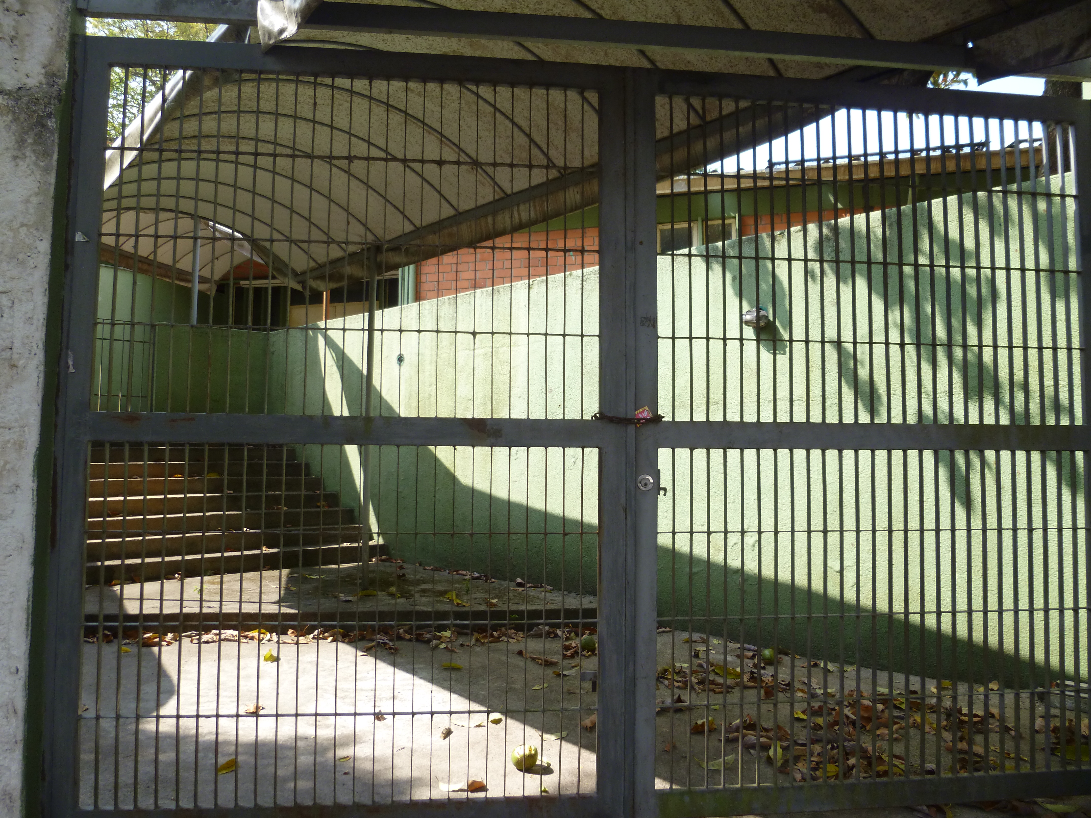 Visão frontal do portão de acesso secundário à Unidade.